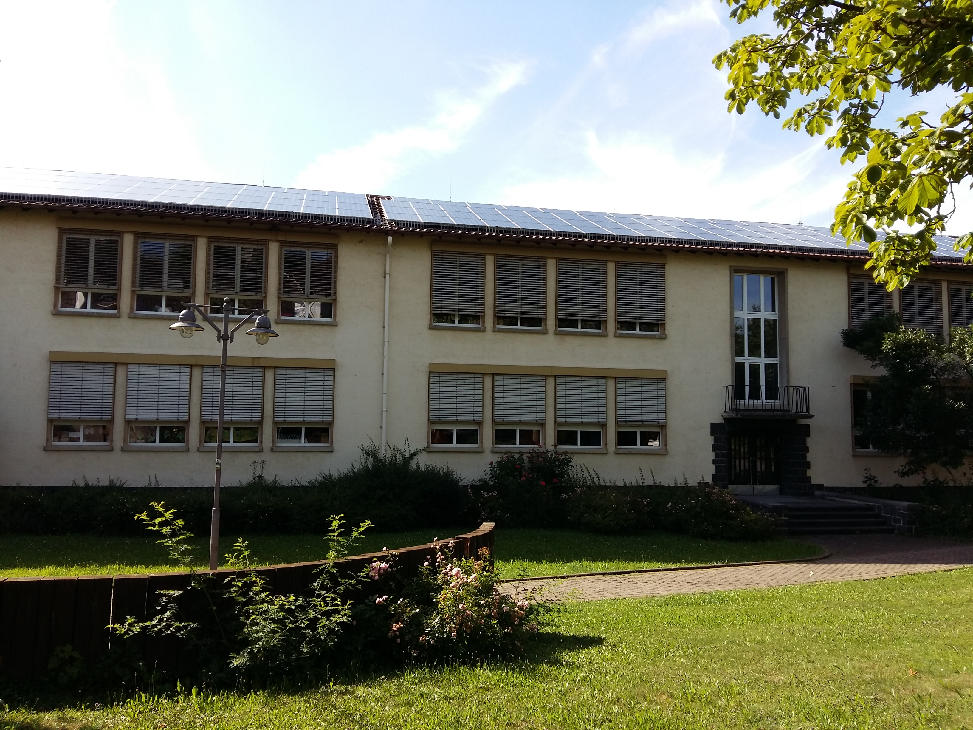 Haupthaus der Haslochbergschule in Groß-Bieberau